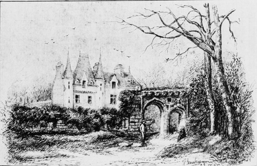 Le château de Trébriant en Trémel (demeure de Guy Eder de La Fontenelle, source J. Baudry, 1920, La Fontenelle, le ligueur, le brigandage, ..